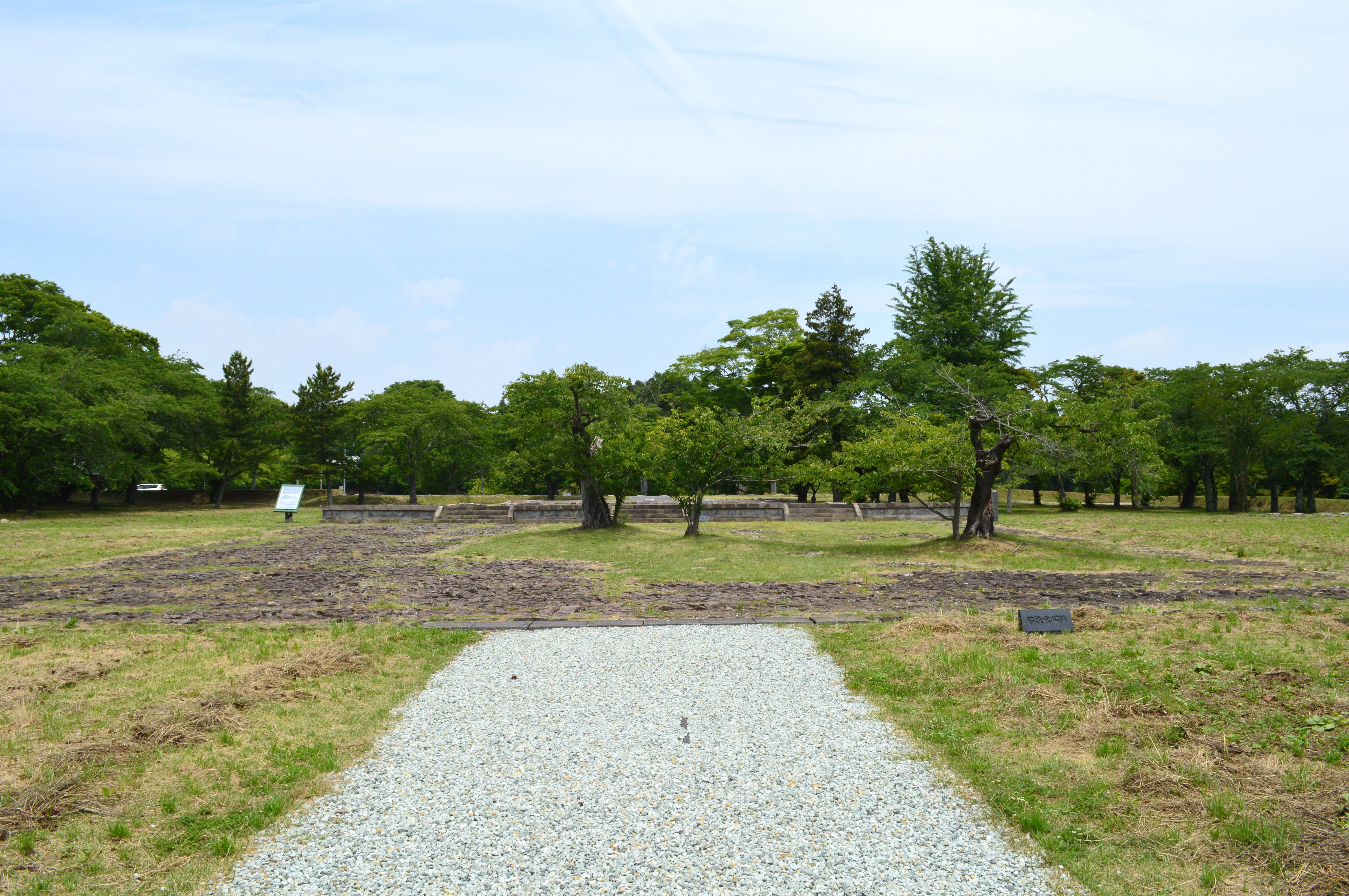 多賀城政庁跡 石敷広場（手前）と正殿（奥）